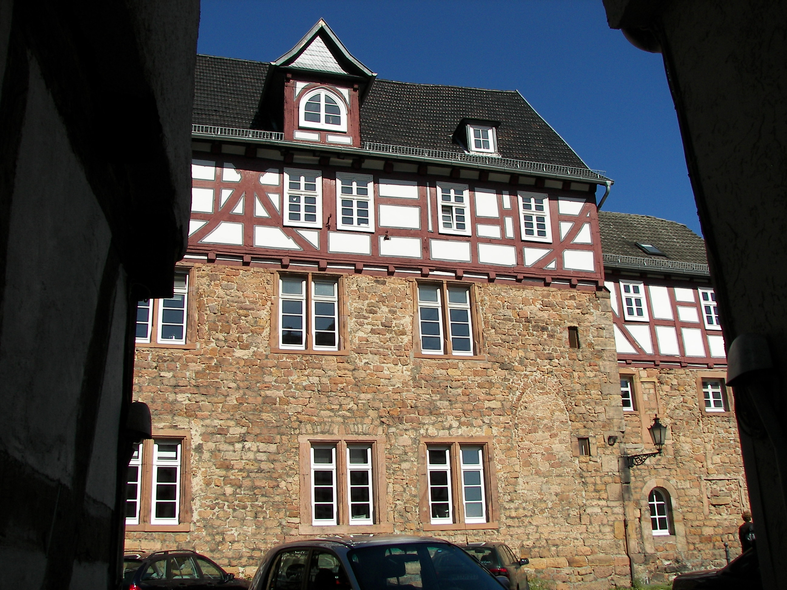 Marburg, Kilianskapelle